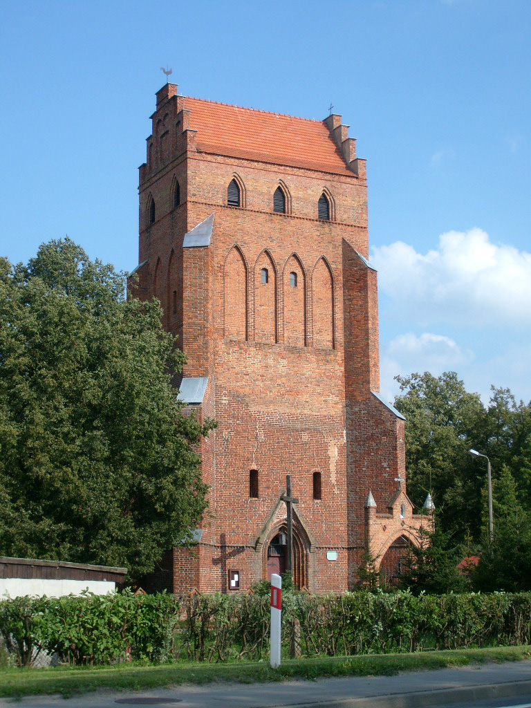 The church in Lignowy Szlacheckie, Poland